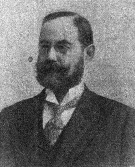 Österreichischer Politiker, Reichsratswahl 1907, Name siehe Dateiname